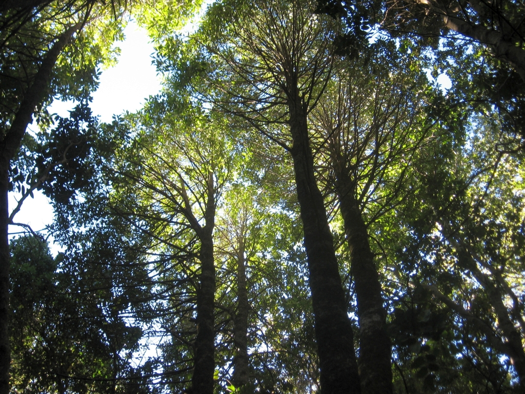 © Pablo Bravo Monasterio Bosque siempre verde de Queule, olivillo, avellano, Laurel, Hualo y Haulle